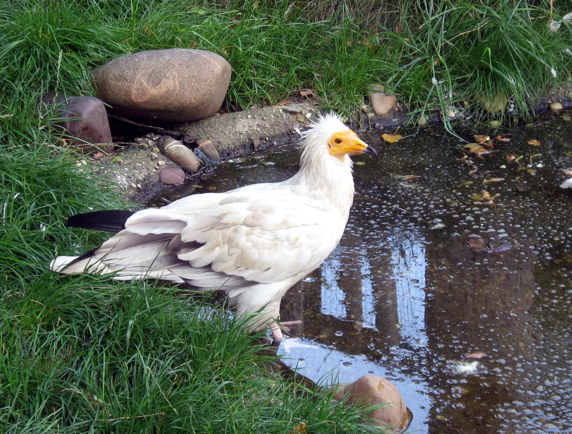 Sup mrchožravýLatina: Neophron percnopterus